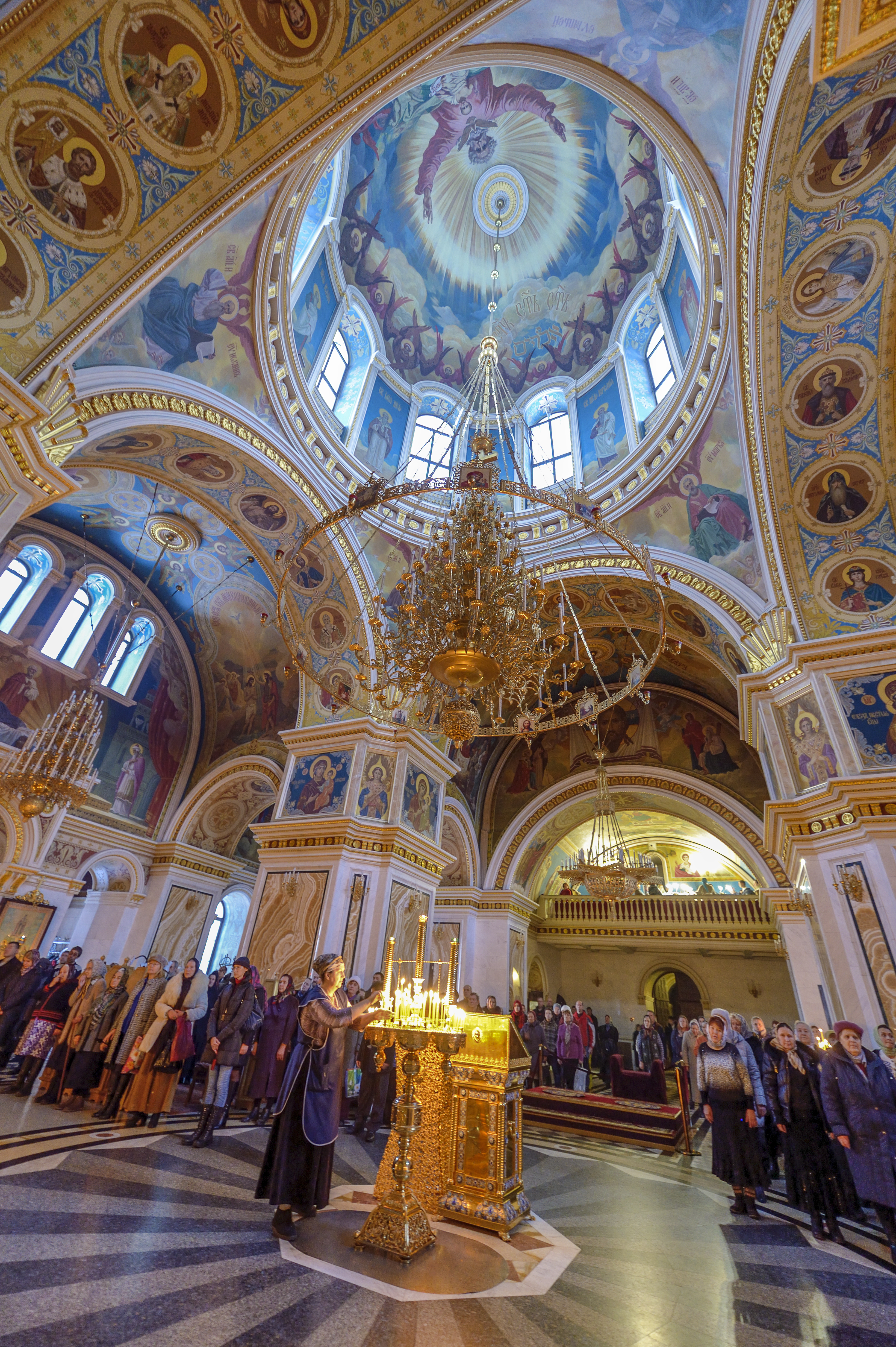 Храм Рождества Пресвятой Богородицы в Уфе